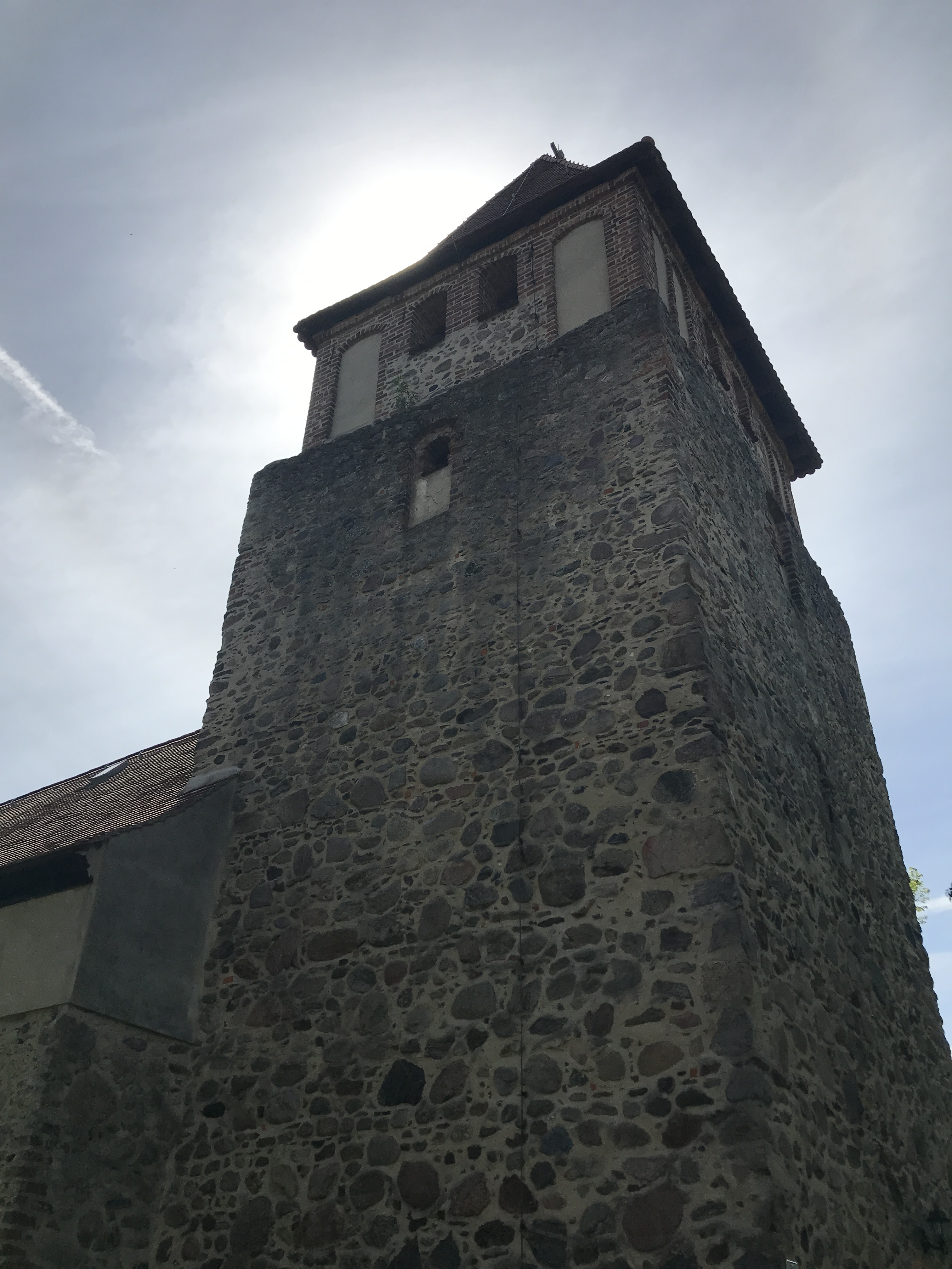 Die Dorfkirche Krugau ist eine Feldsteinkirche aus dem 15. Jahrhundert in der Gemeinde Märkische Heide im Landkreis Dahme-Spreewald in Brandenburg. Im Innern steht unter anderem ein Kanzelaltar aus dem Anfang des 18. Jahrhundert.